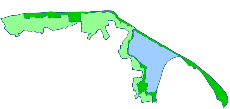 Nadmorski Park Krajobrazowy mapa